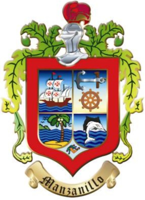 Escudo de Manzanillo, Colima, Mexico